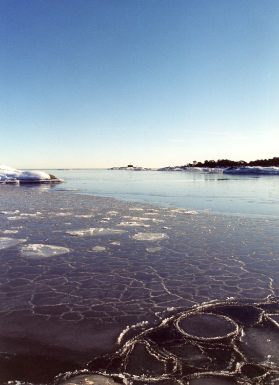 Utö vid Fårskärasudden, februari 2003